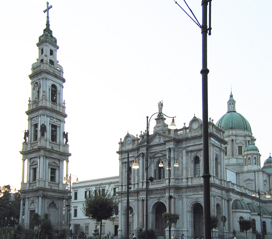 Santuario Pompei